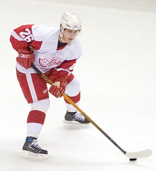 Jiri Hudler, Detroit Red Wings vs. San Jose Sharks